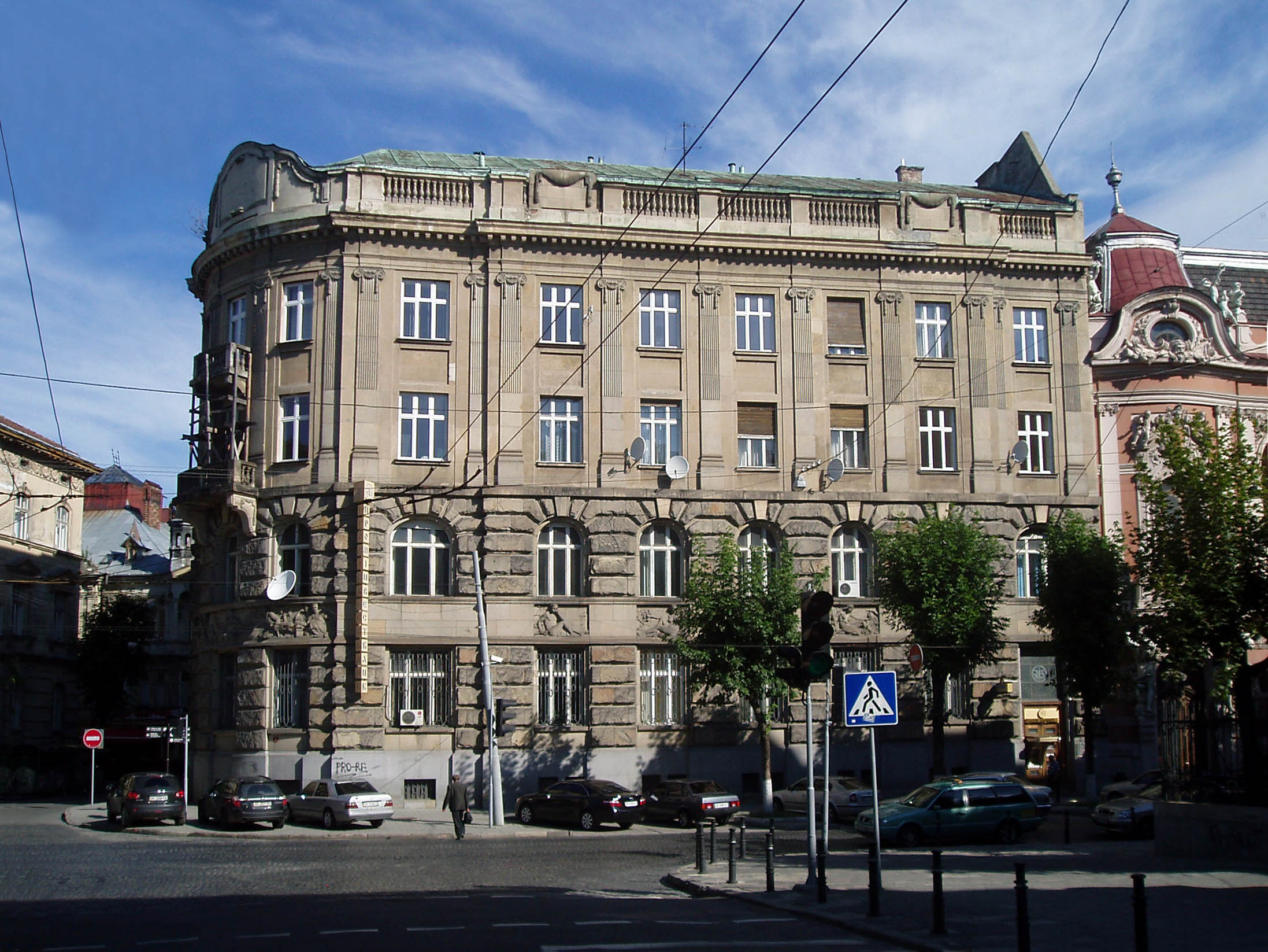 Будинок № 8 на вулиці Листопадового чину у Львові. Архітектори Едмунд Жихович (1870-1924) та Міхал Лужецький (бл. 1870 - після 1939).